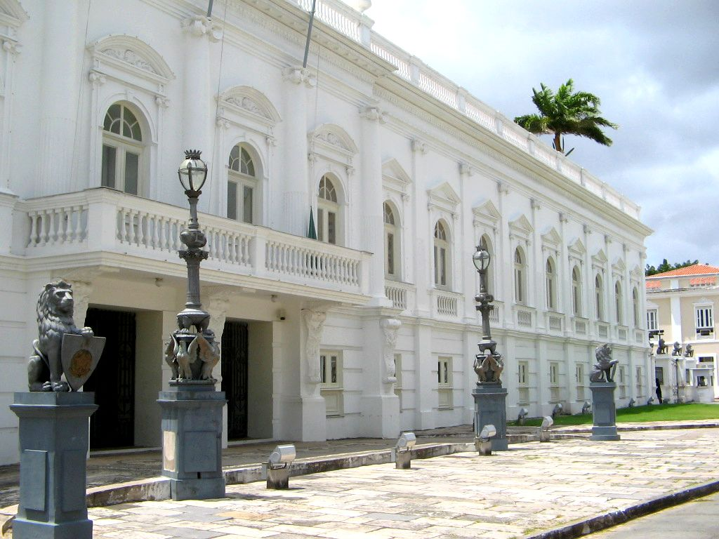 São Luís, MA: conjunto arquitetônico e paisagístico; Palácio dos Leões